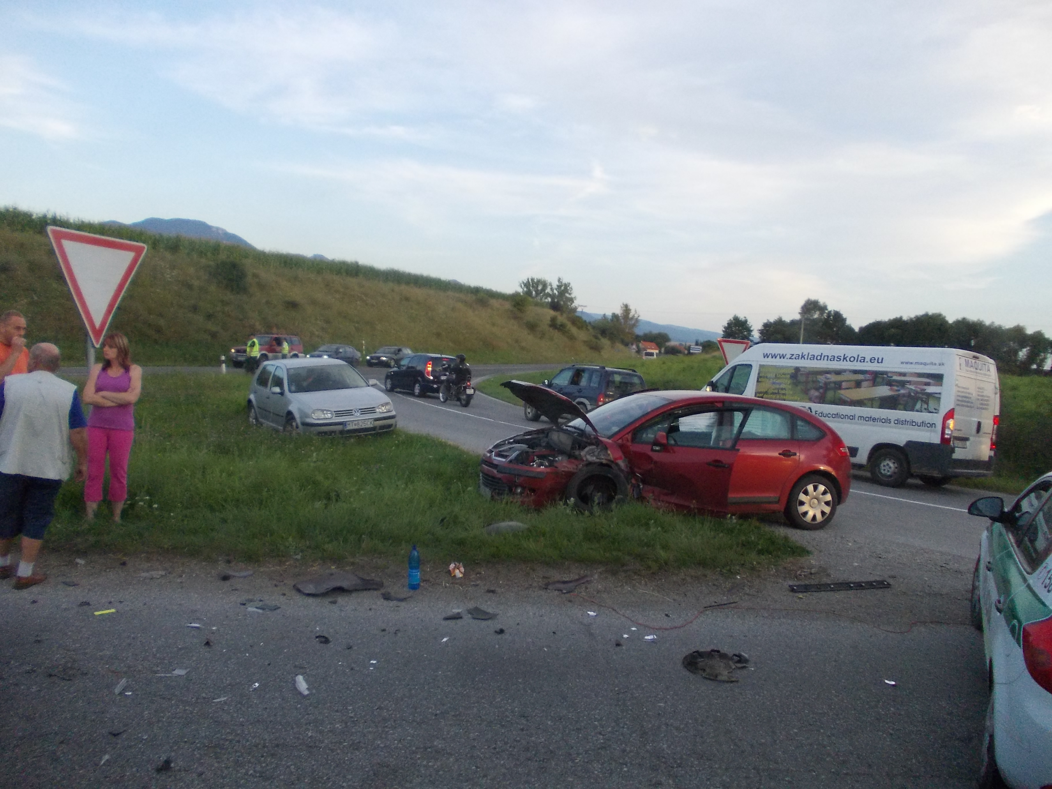 Nehoda na križovatke ciest II/519 a I/65